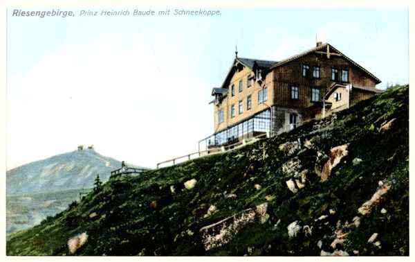 Prinz-Heinrich-Baude in Riesengebirge (1910)